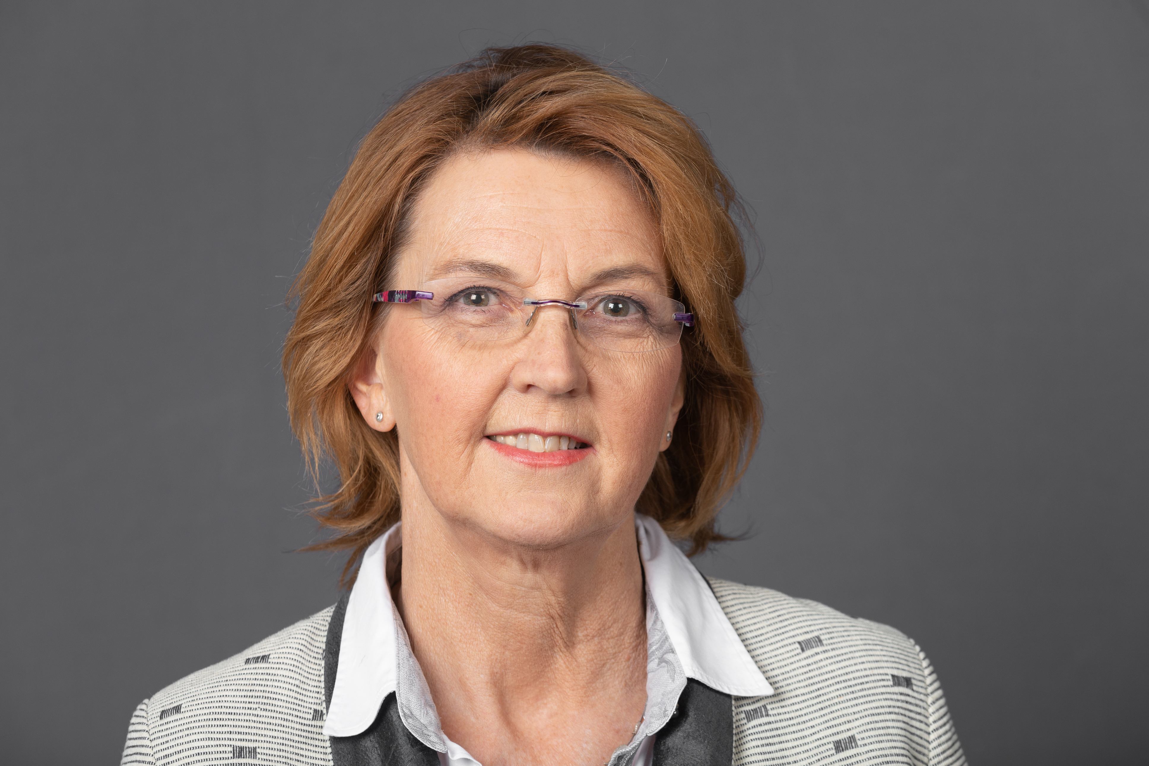 Deutscher Bundestag; Susanne Mittag, SPD